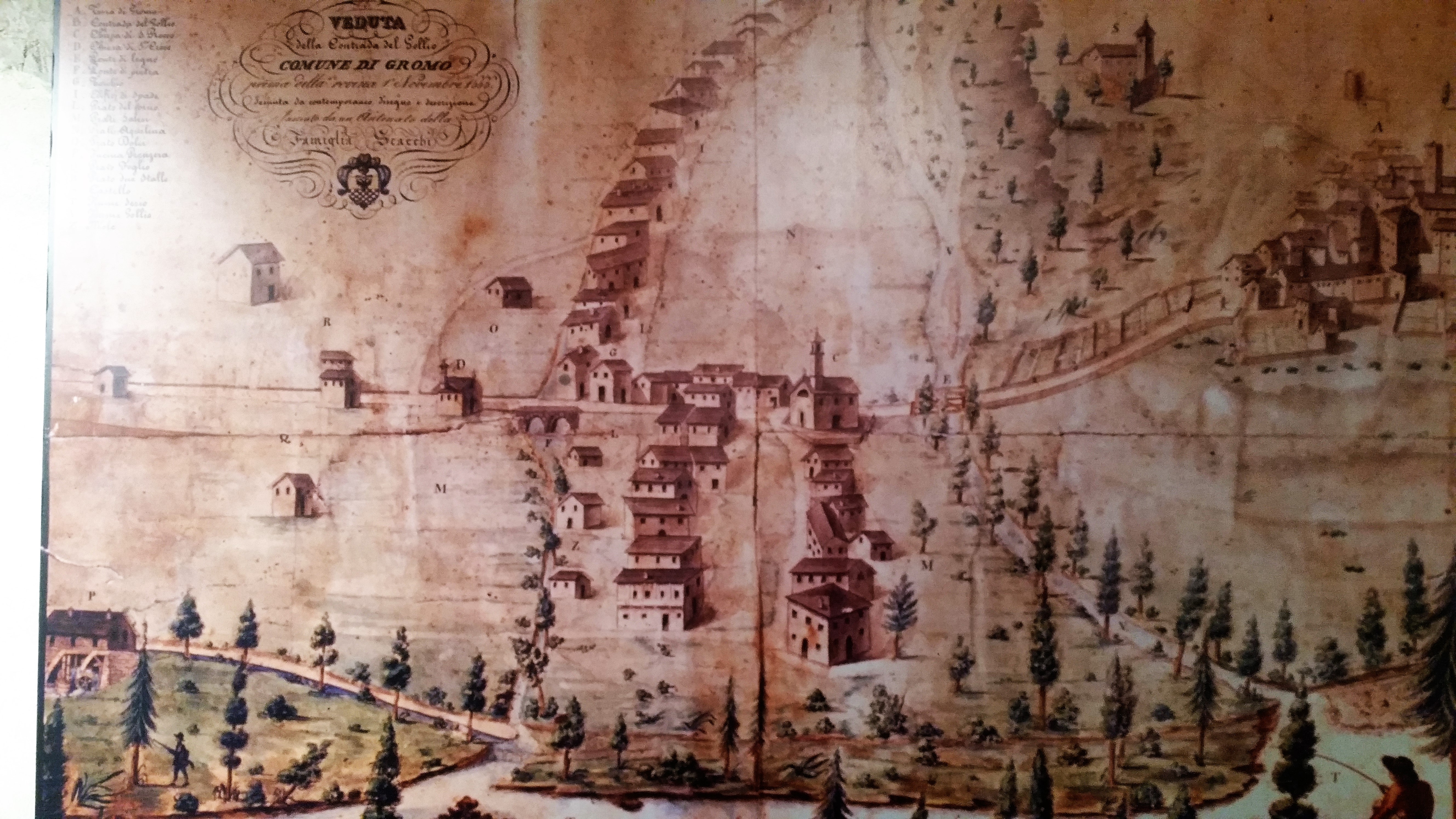 Cartina del sedicesimo secolo di Gromo